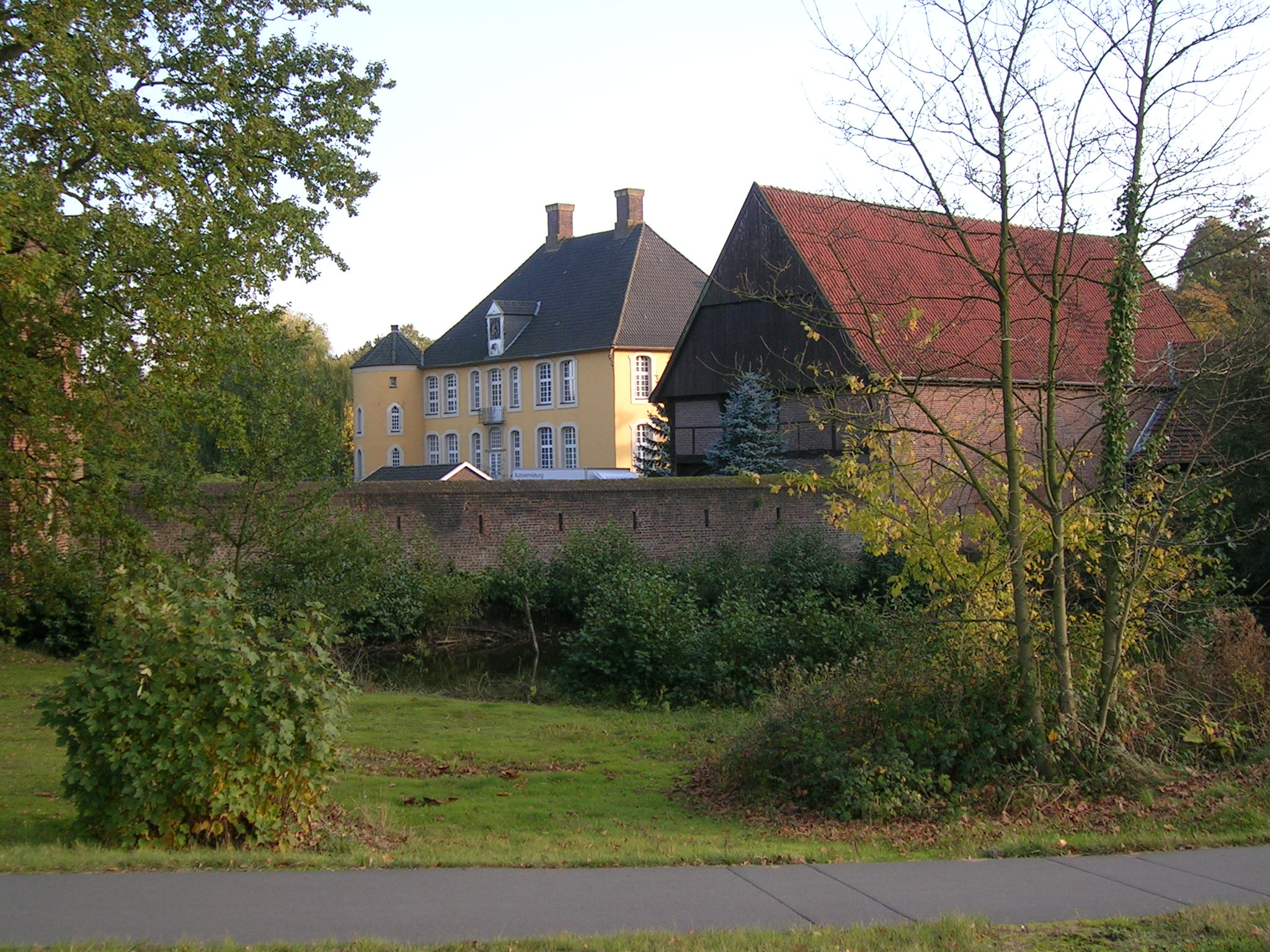 Schloss Diepenbrock in Barlo mit Wehranlage